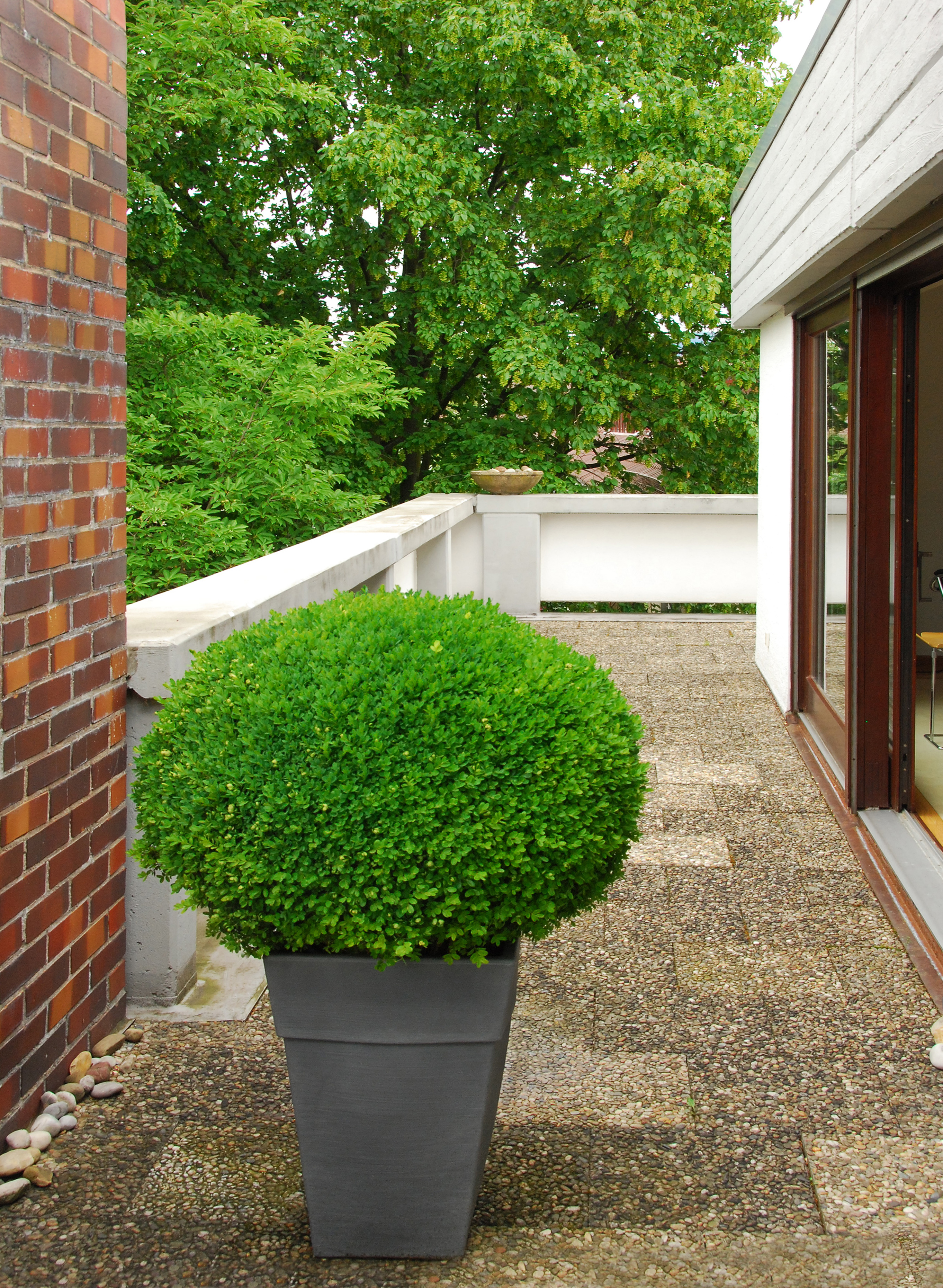 Terrasse Penthouse H.-P.Haack Heidelberg